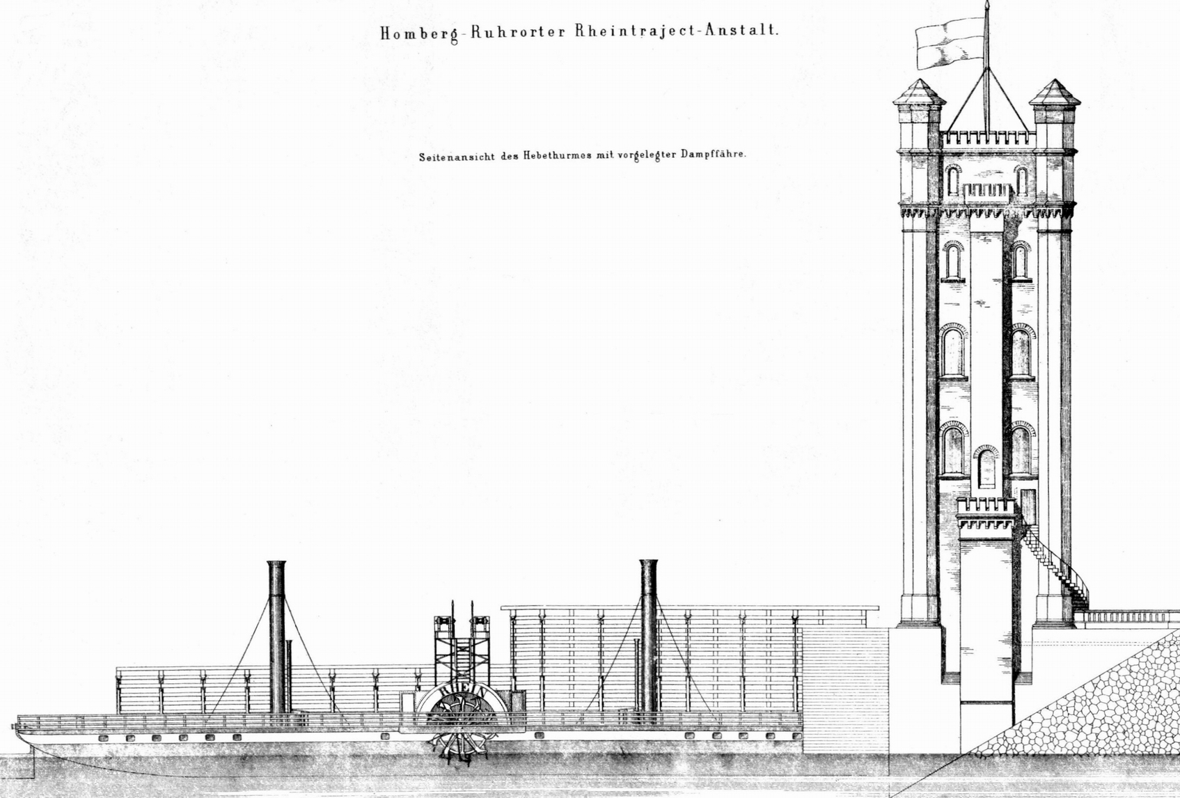 Hebeturm und Schiff des historischen Trajektes Homberg-Ruhrort, Duisburg